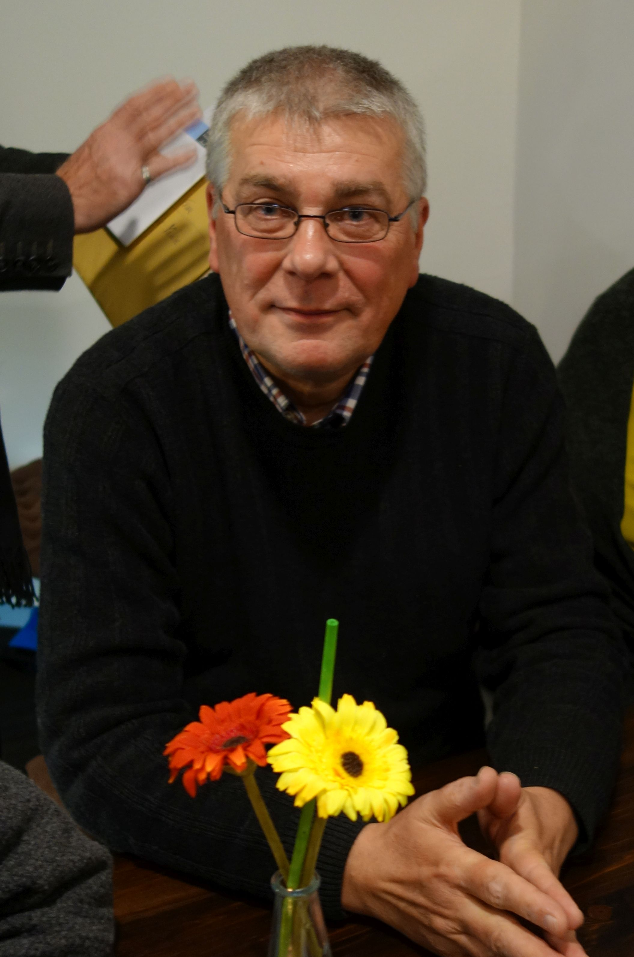 Reinhard Kiefer auf der Veranstaltung „Fremde, Nachbarn, Freunde“ in der Patisserie Tanger, Düsseldorf, 1. Oktober 2015. Reinhard Kiefer (* 12. Oktober 1956 in Nordbögge) ist ein deutscher Schriftsteller und Literaturwissenschaftler.